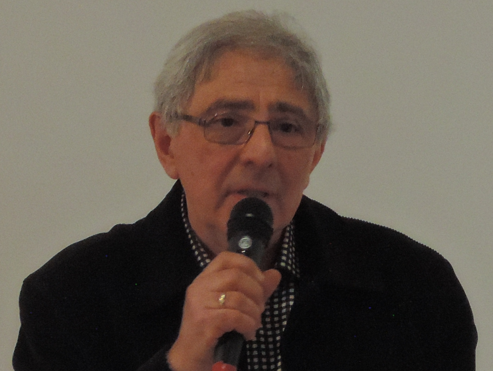 Композиторът и музикант Хайгашод Агасян по време на „Арменска вечер“ в Музея за история на София, 21 февруари 2017 г.